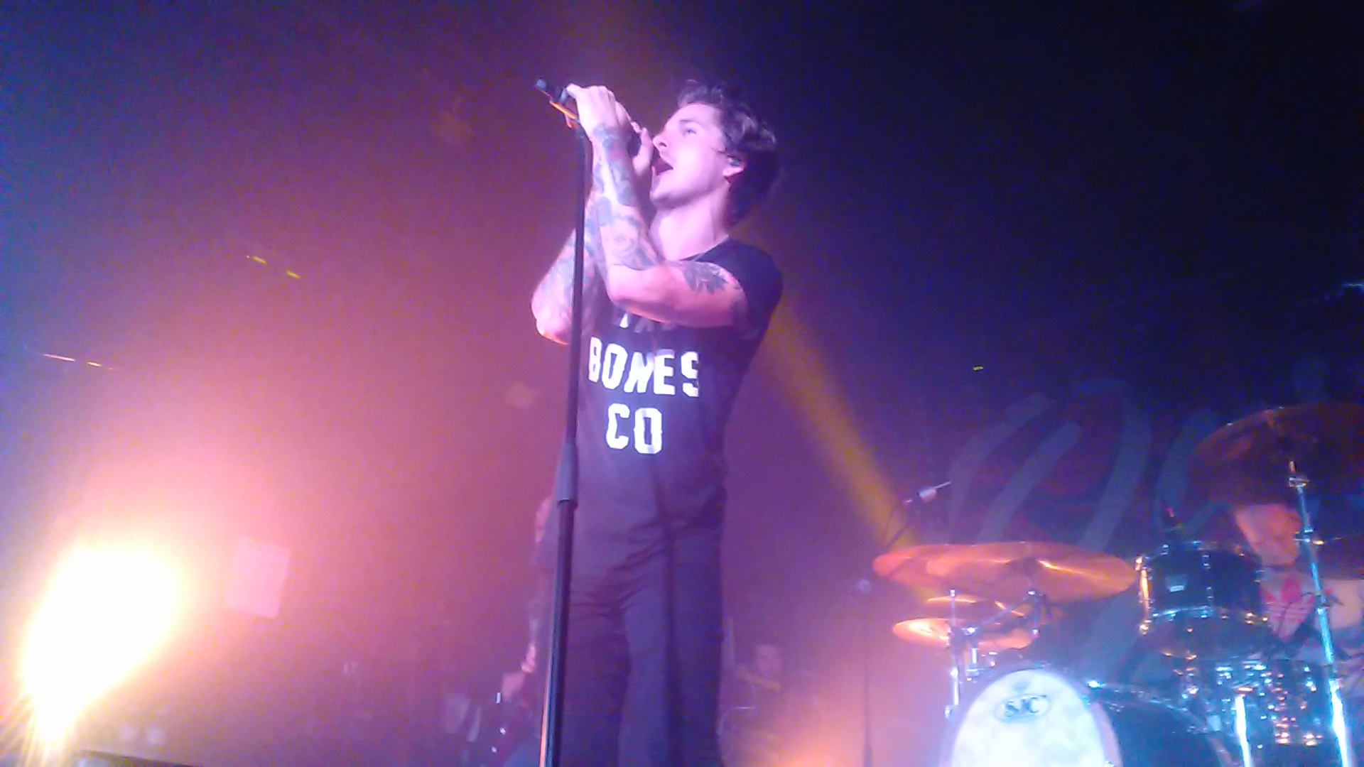 Trevor Wentworth, cantante de Our Last Night en el concierto de Madrid del 19 de Octubre de 2017